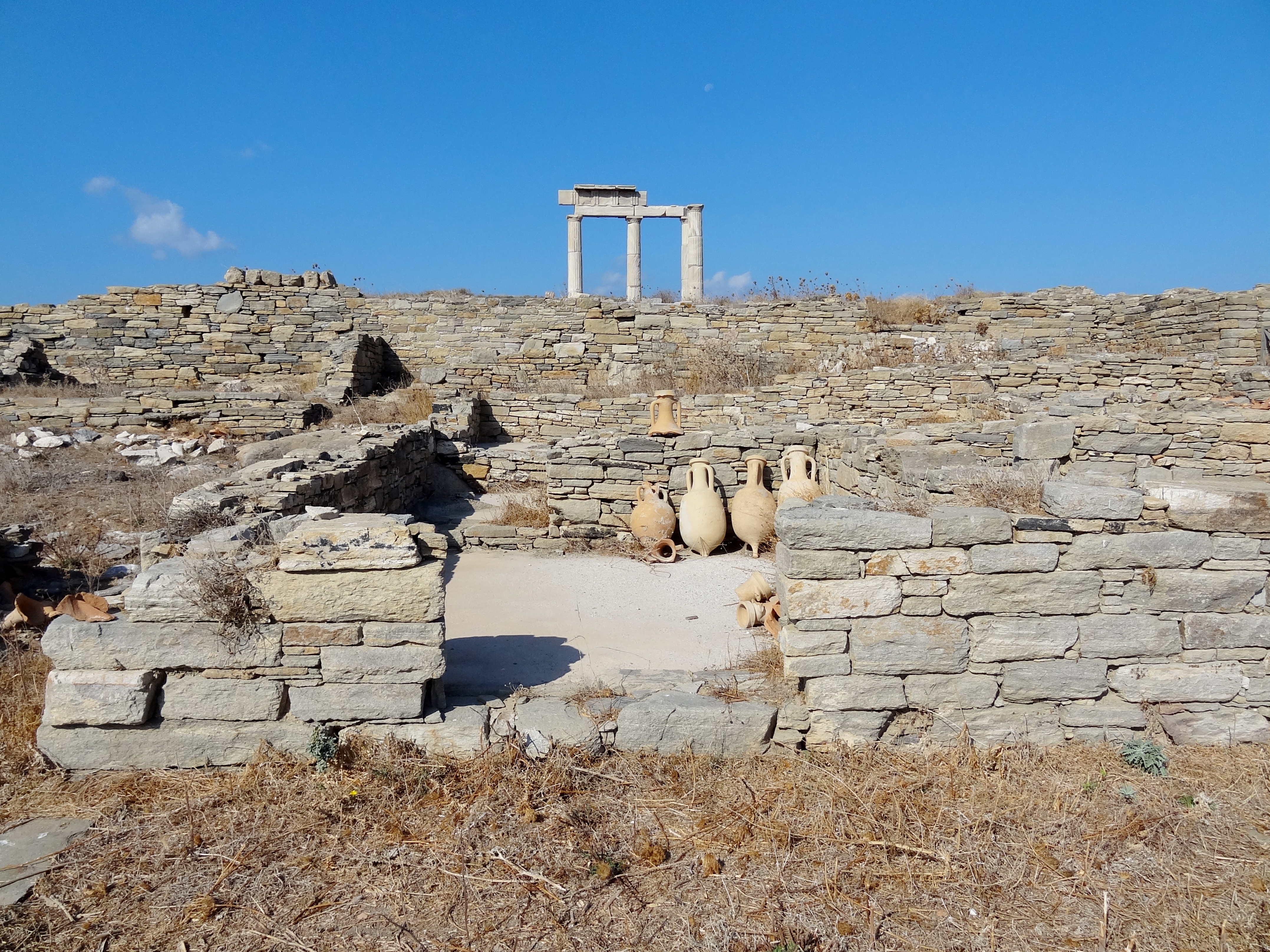 Werkstatt oder Laden in der Ausgrabungsstätte von Delos, Kykladen, Griechenland